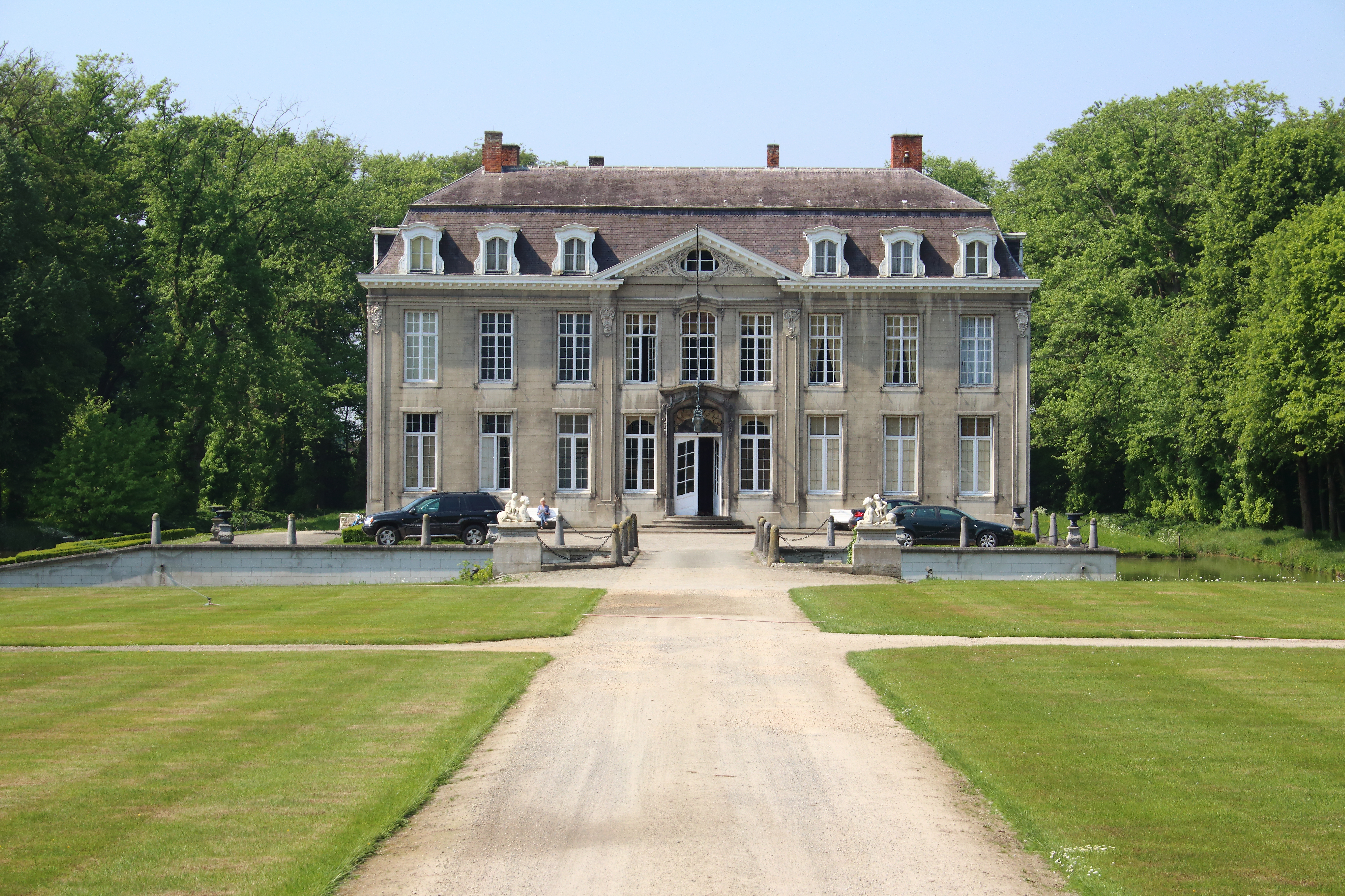 Kasteel van Leeuwergem, Zottegem, Vlaanderen, België